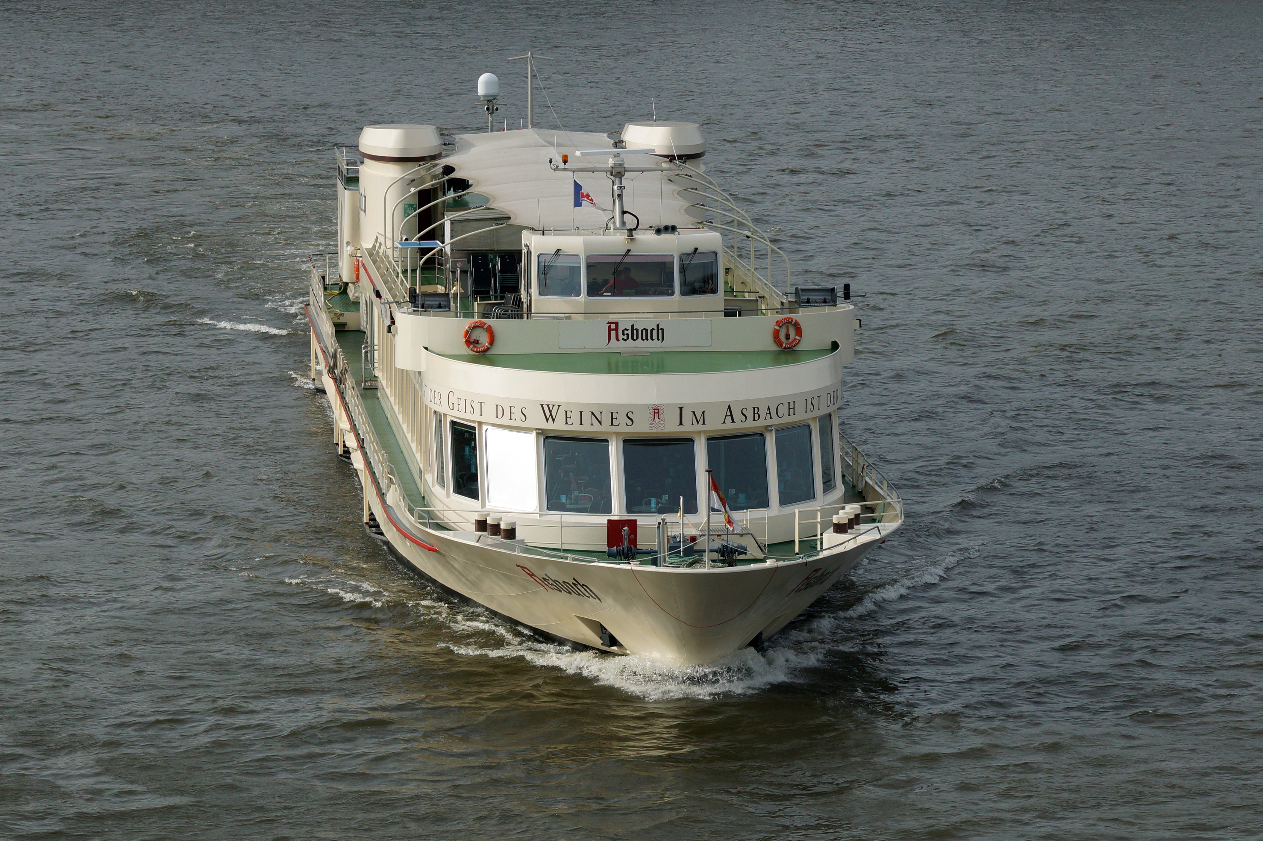 Tagesausflugschiff Asbach bei einer außerplanmäßigen Leerfahrt in Köln.